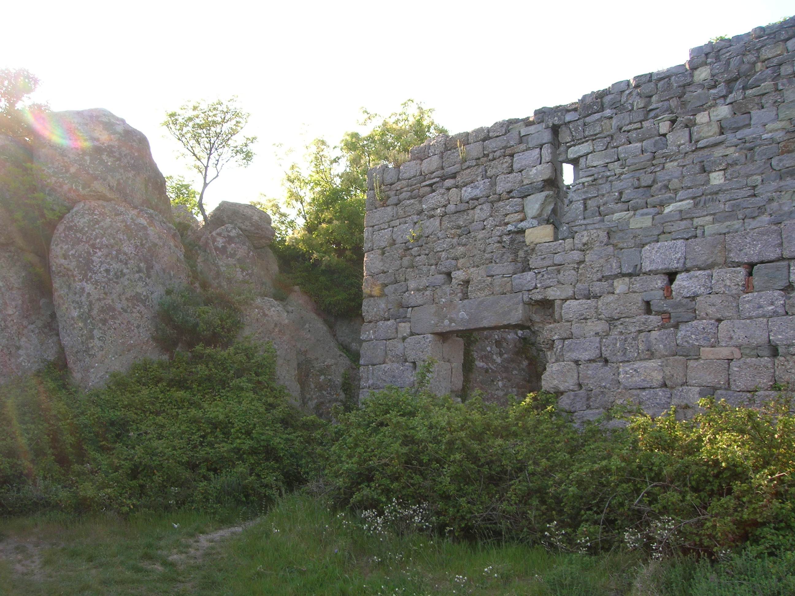 Rocca della Verruca, ingresso sul lato est della chiesa